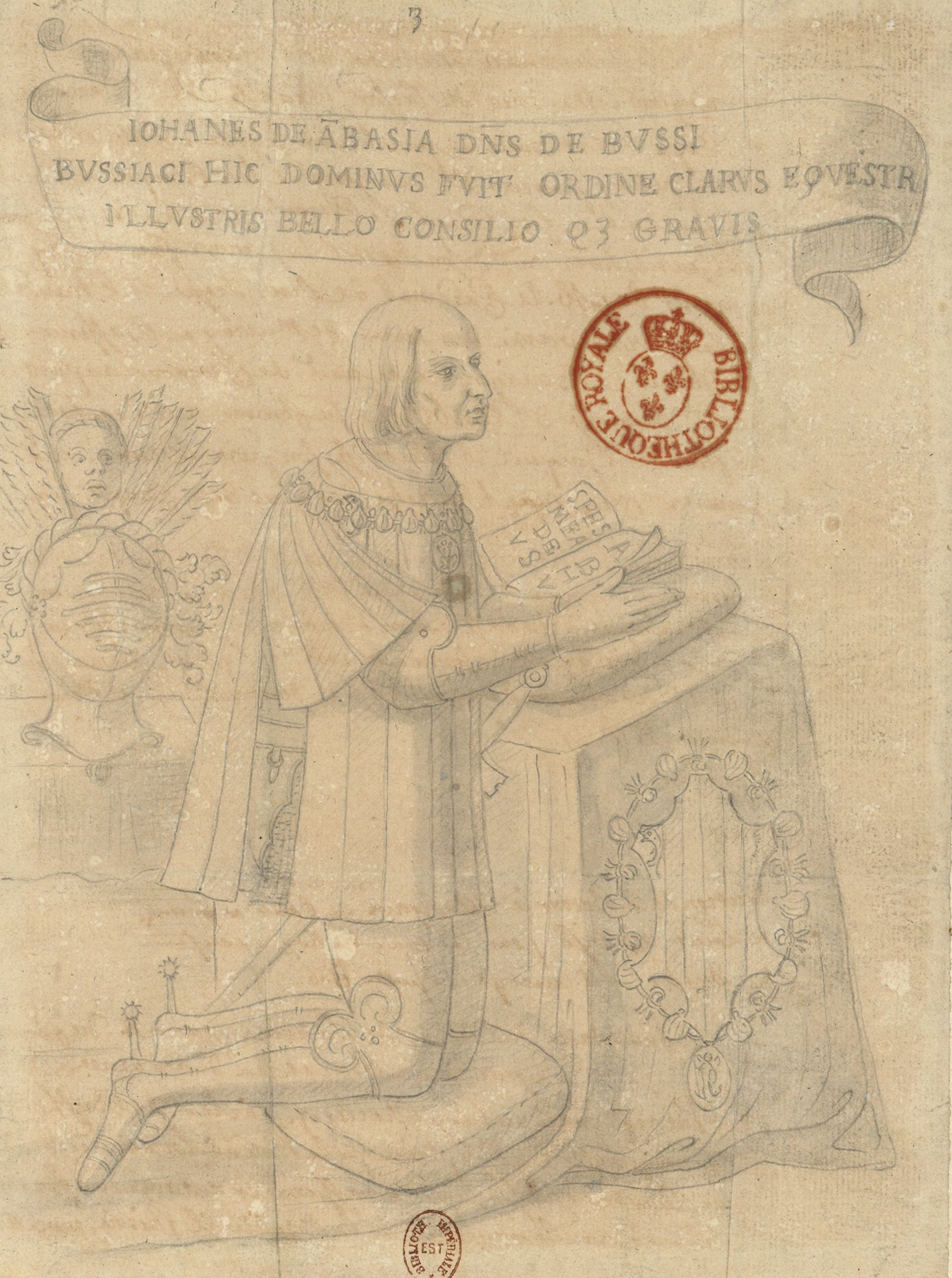 Jean d'Amboise, seigneur de Bussy (1440-1516). Gouverneur de Normandie et frère du cardinal Georges d'Amboise, ministre du roi Louis XII.